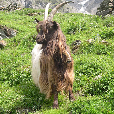 Kupferhalsziege, Projekt von ProSpecieRara